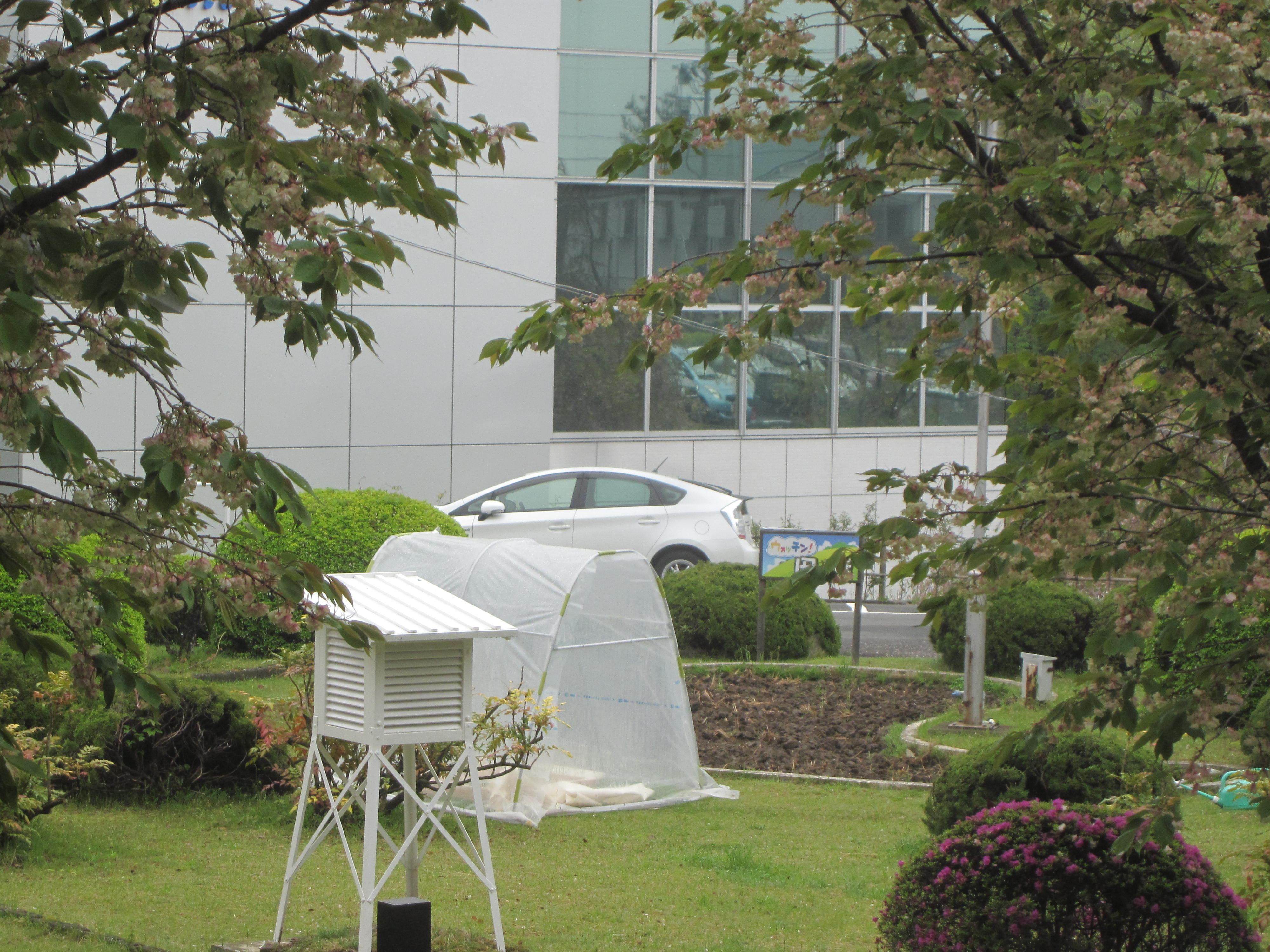 2016年5月2日、投稿者自身による撮影。